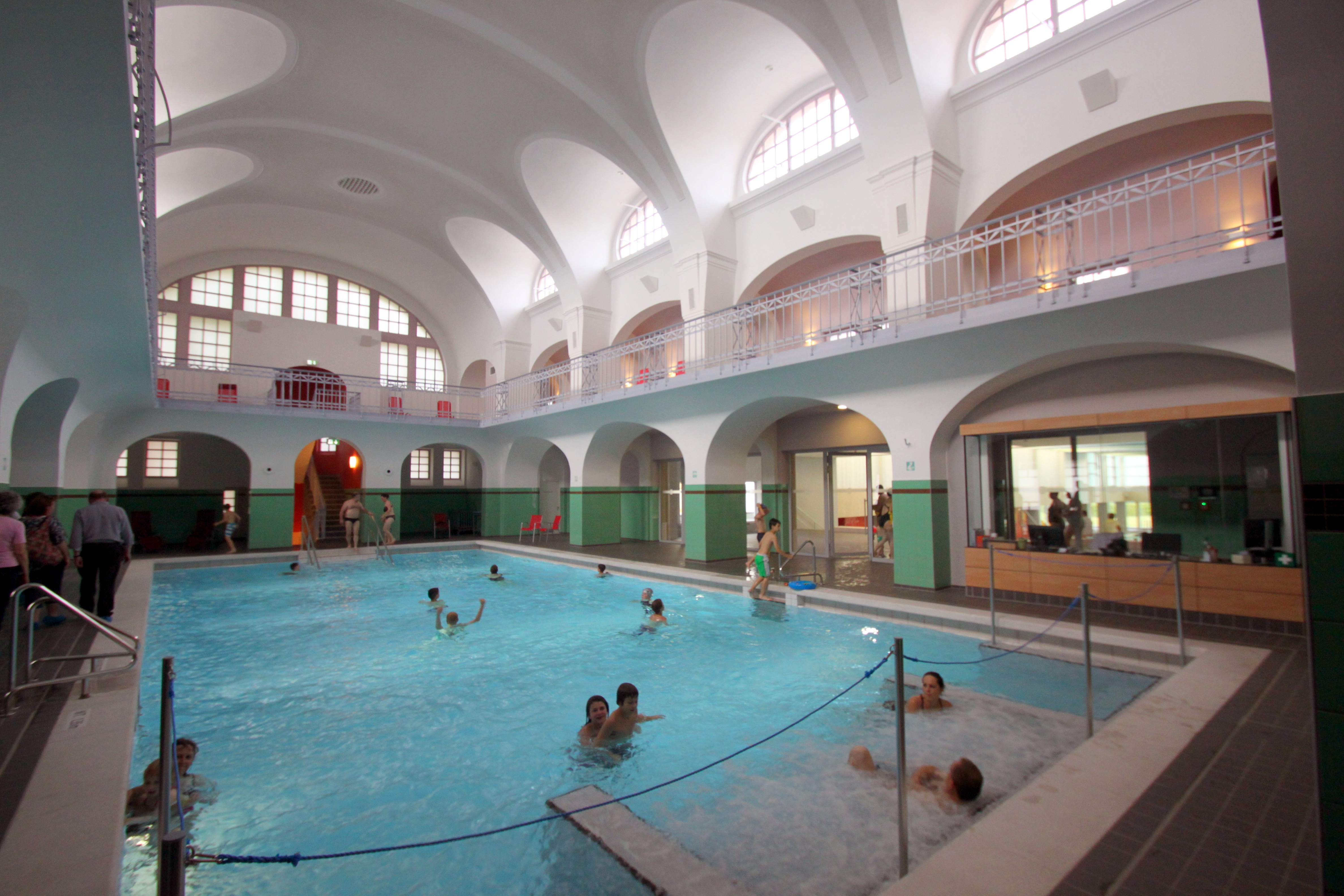 Das Schwimmbecken im historischen Stadtbad in Gotha